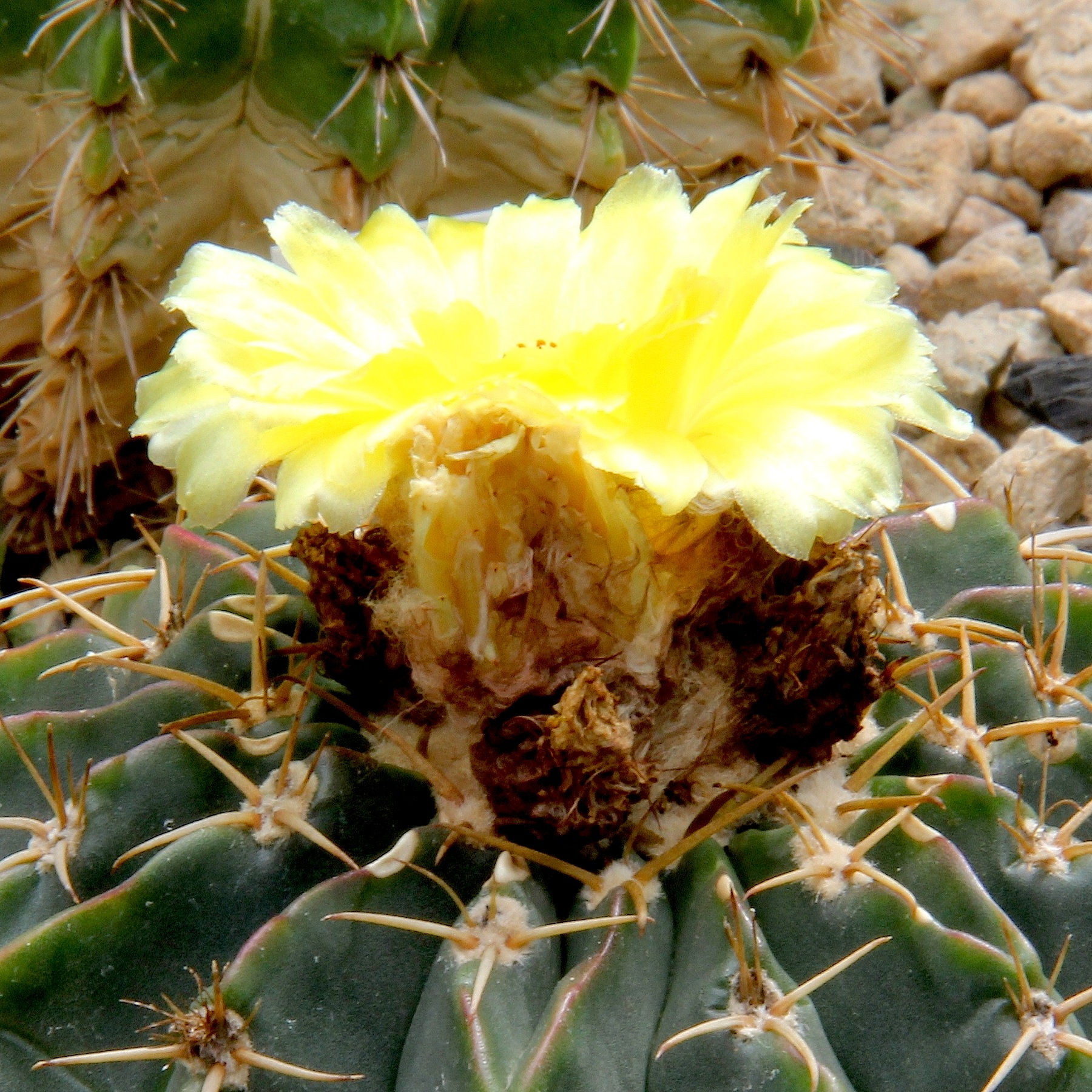 Parodia sellowii